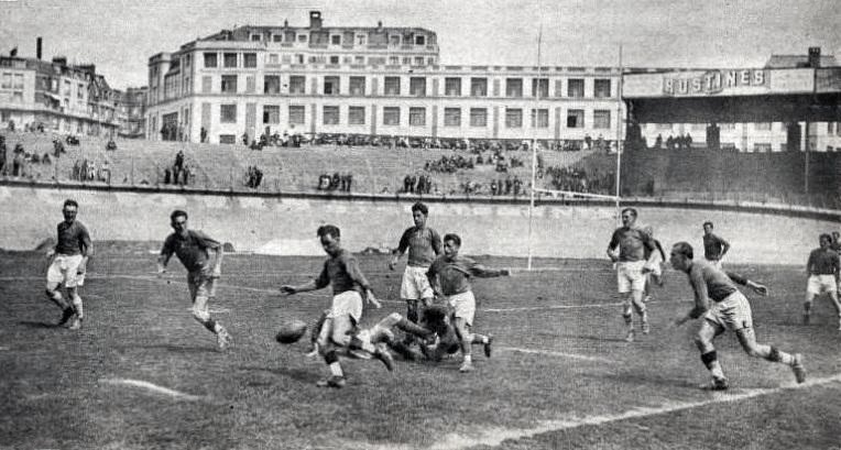 Le Miroir des sports.